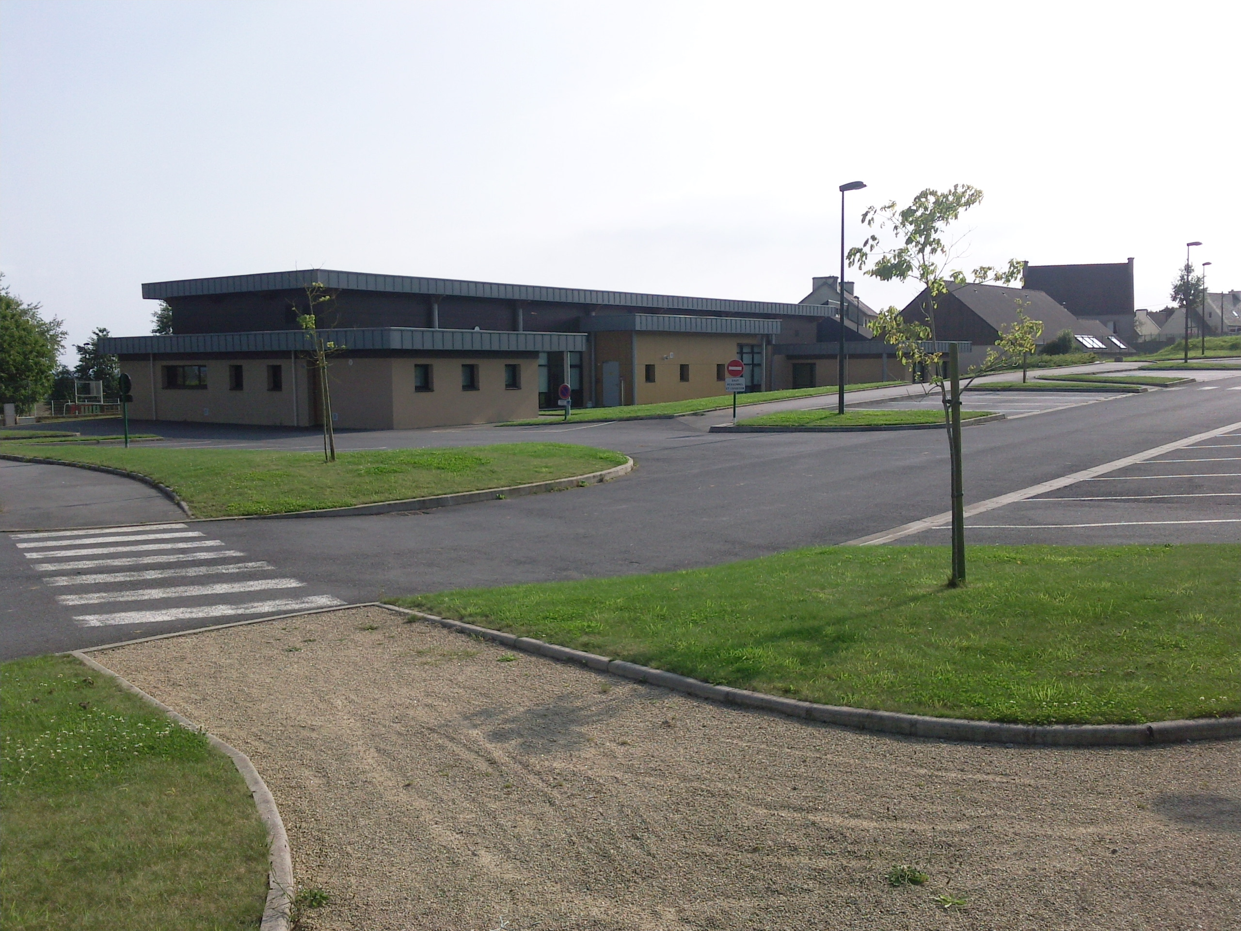 Salle de sports de Dirinon